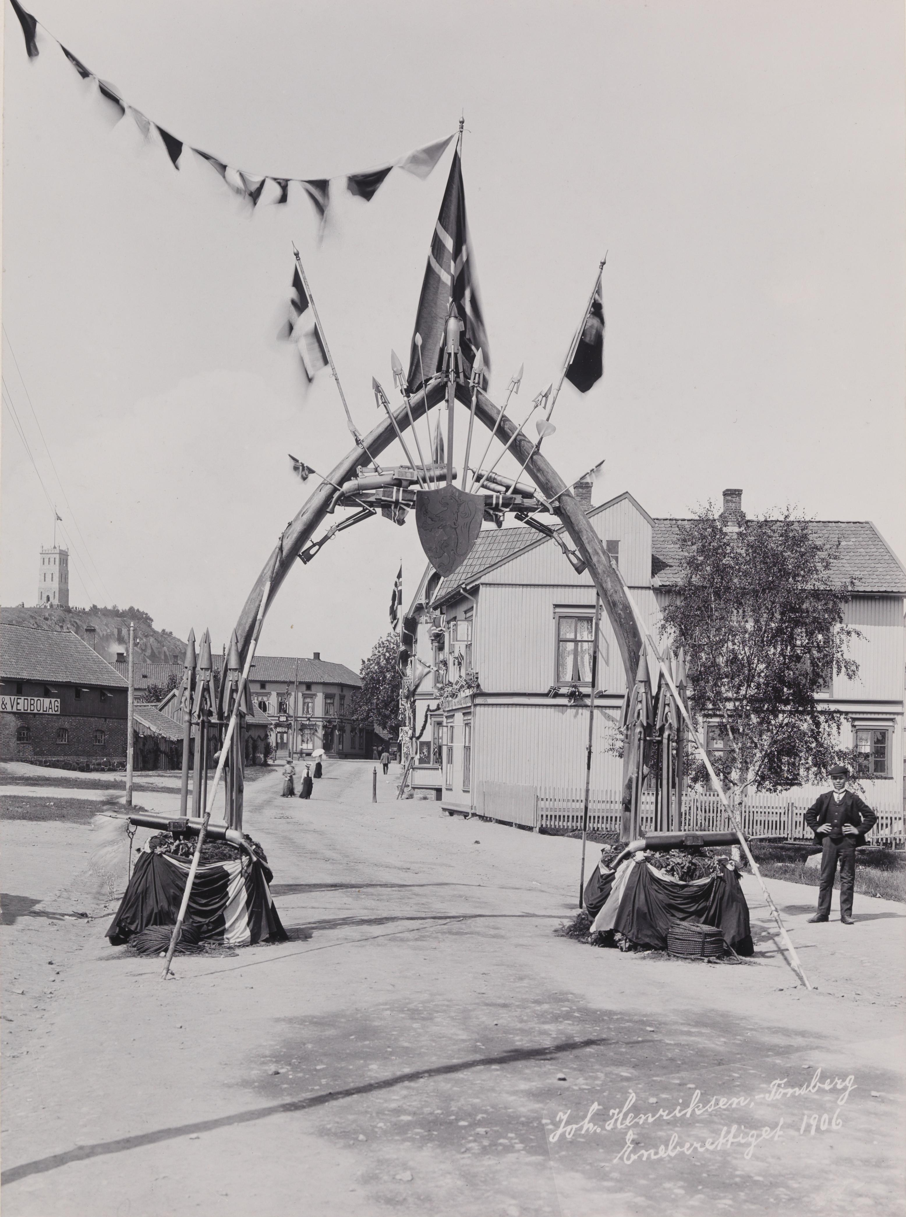 Bildet er hentet fra Nasjonalbibliotekets bildesamling. Anmerkninger til bildet var: Tittel hentet fra påskrift på komponentnr 1